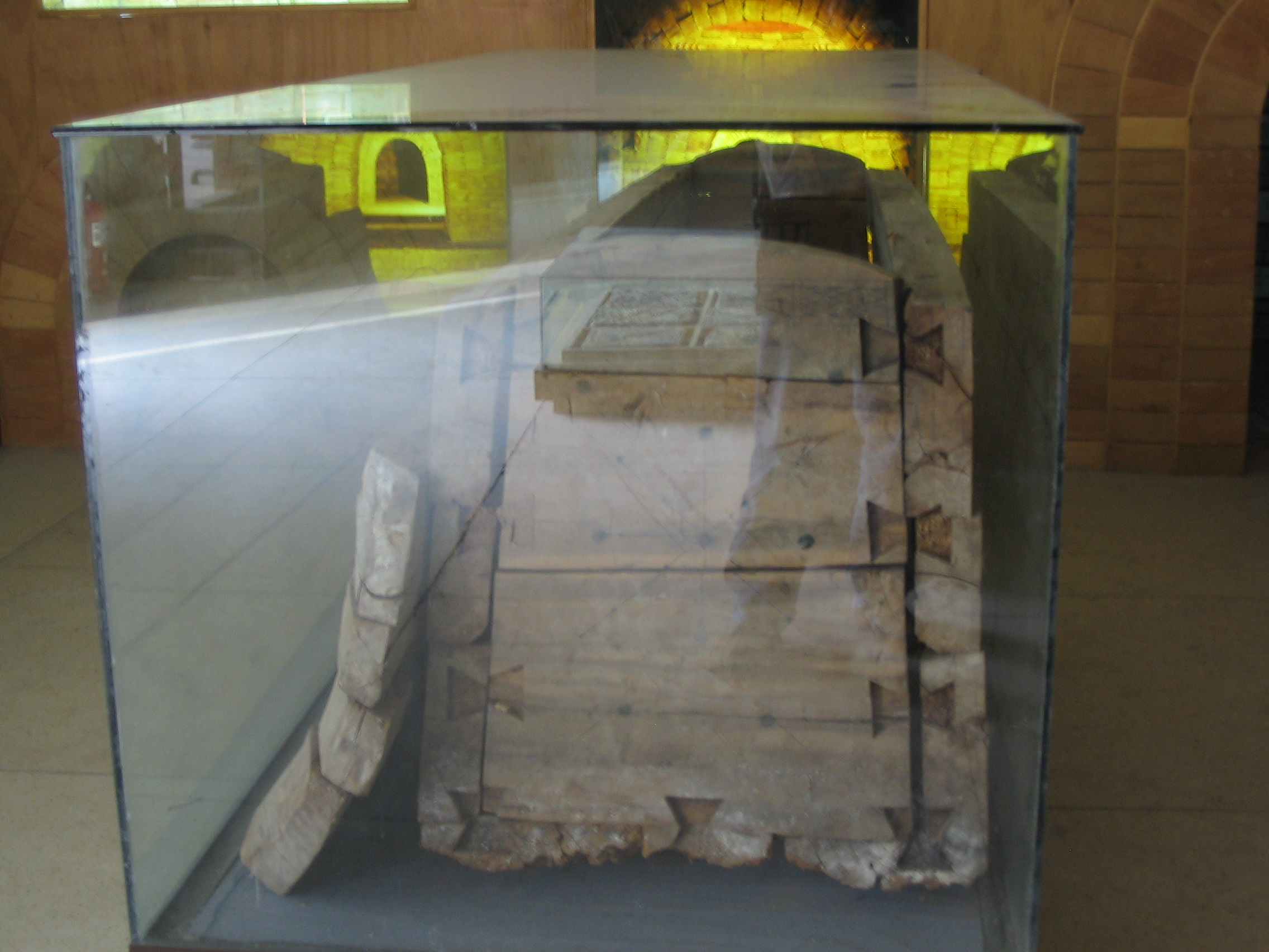 Jiayuguan - TombeWeiJin